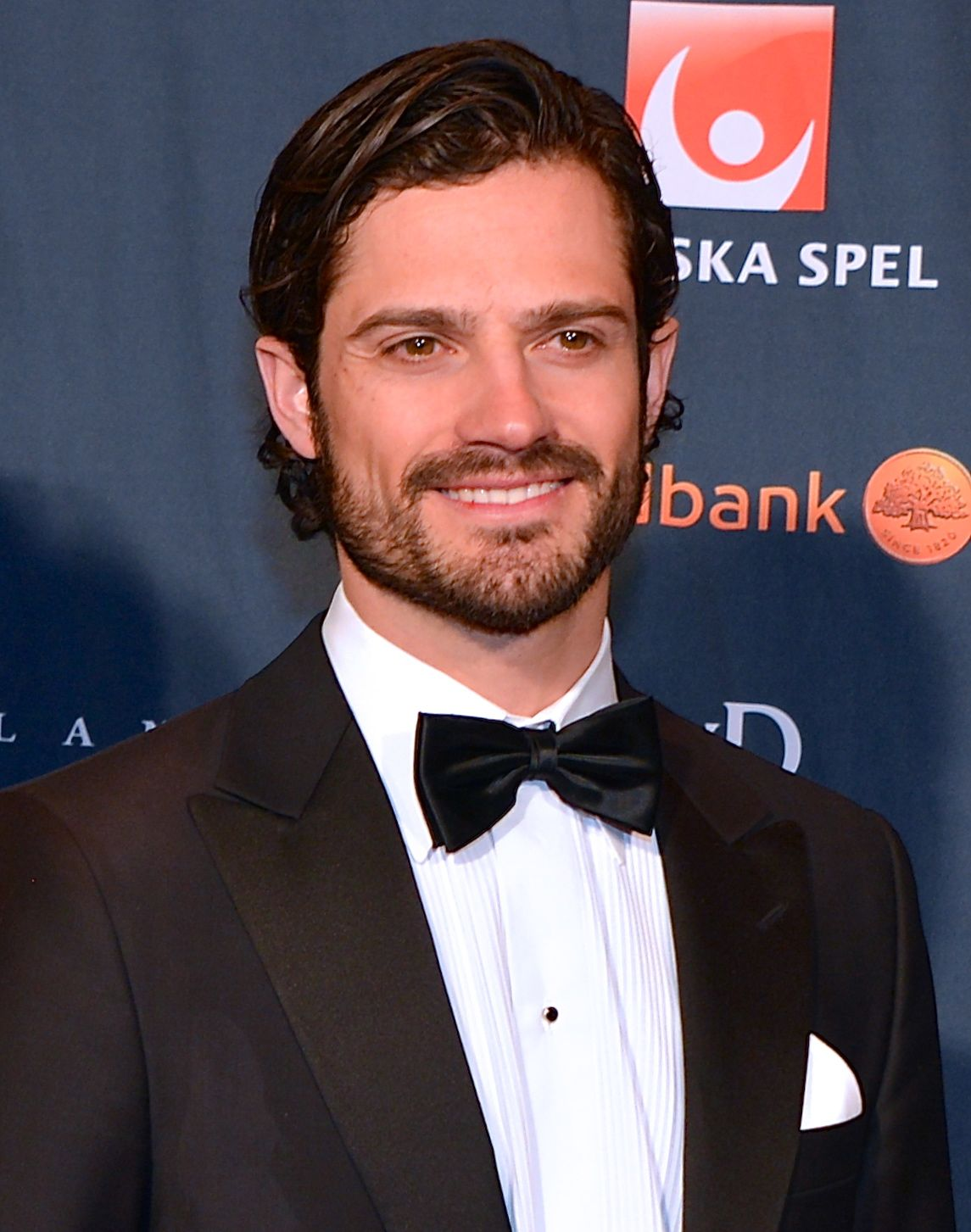 Prins Carl Philip på Idrottsgalan på Globen i Stockholm den 14 januari 2013.